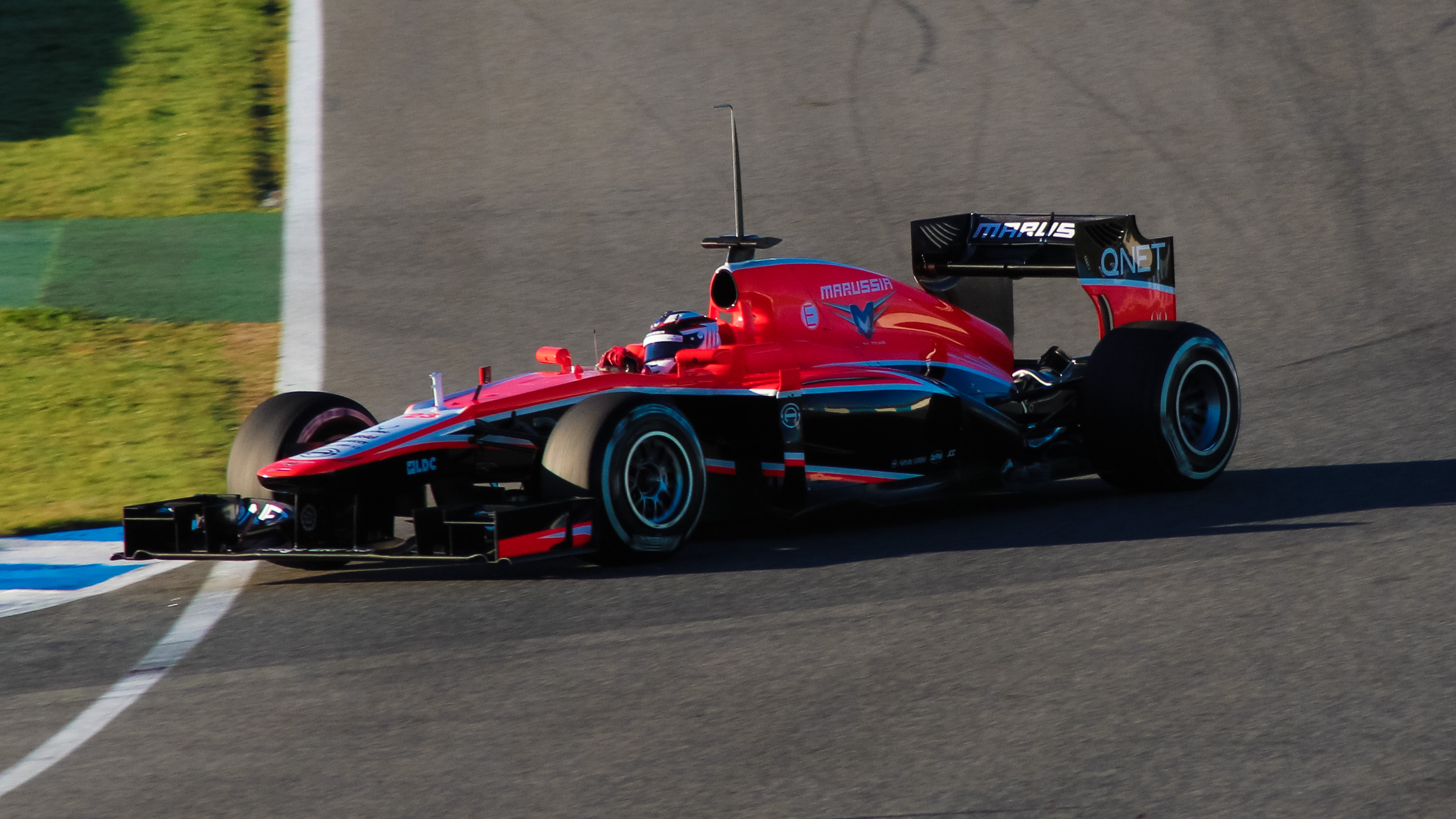 Fotos hechas el 7 de Febrero de 2013 en el circuito de Jerez, plena pre-temporada de F1. Would you like to follow me on Instagram and Twitter?